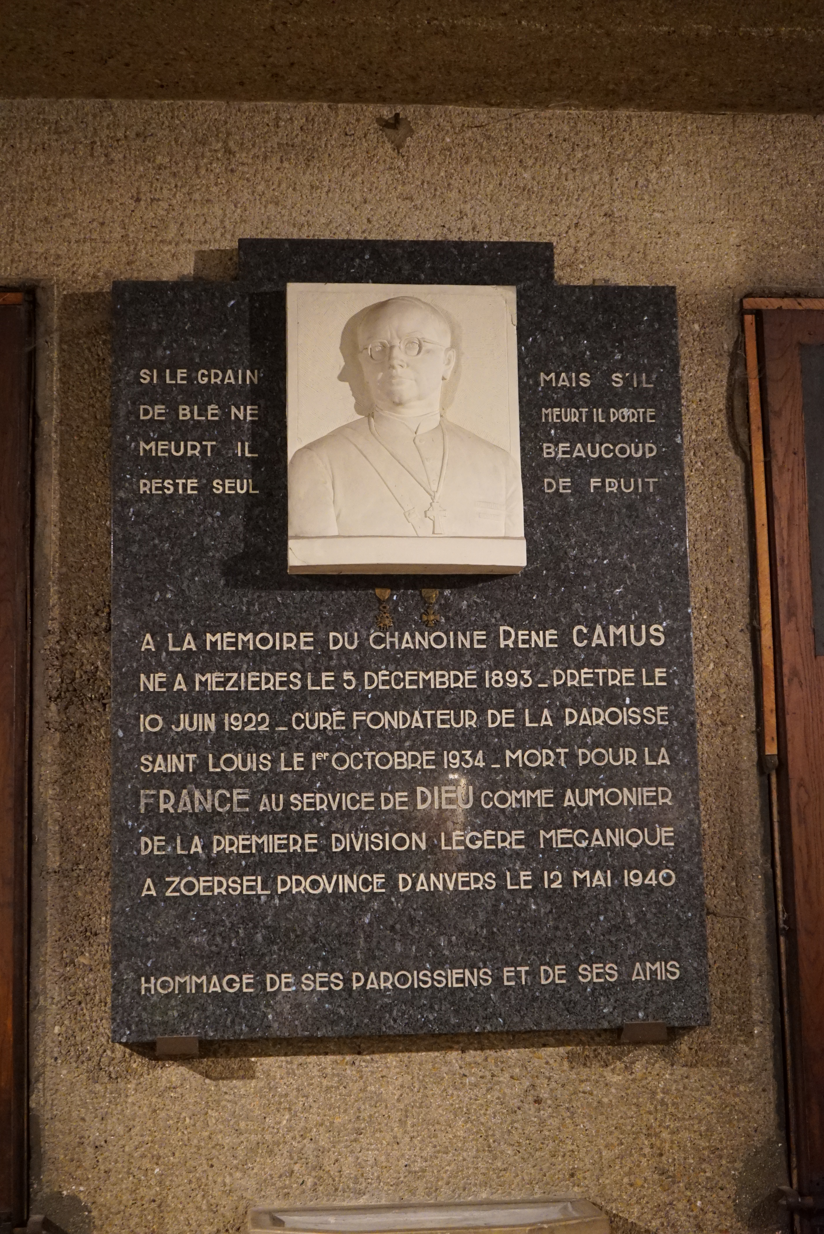 concert en cf. ci-dessus.